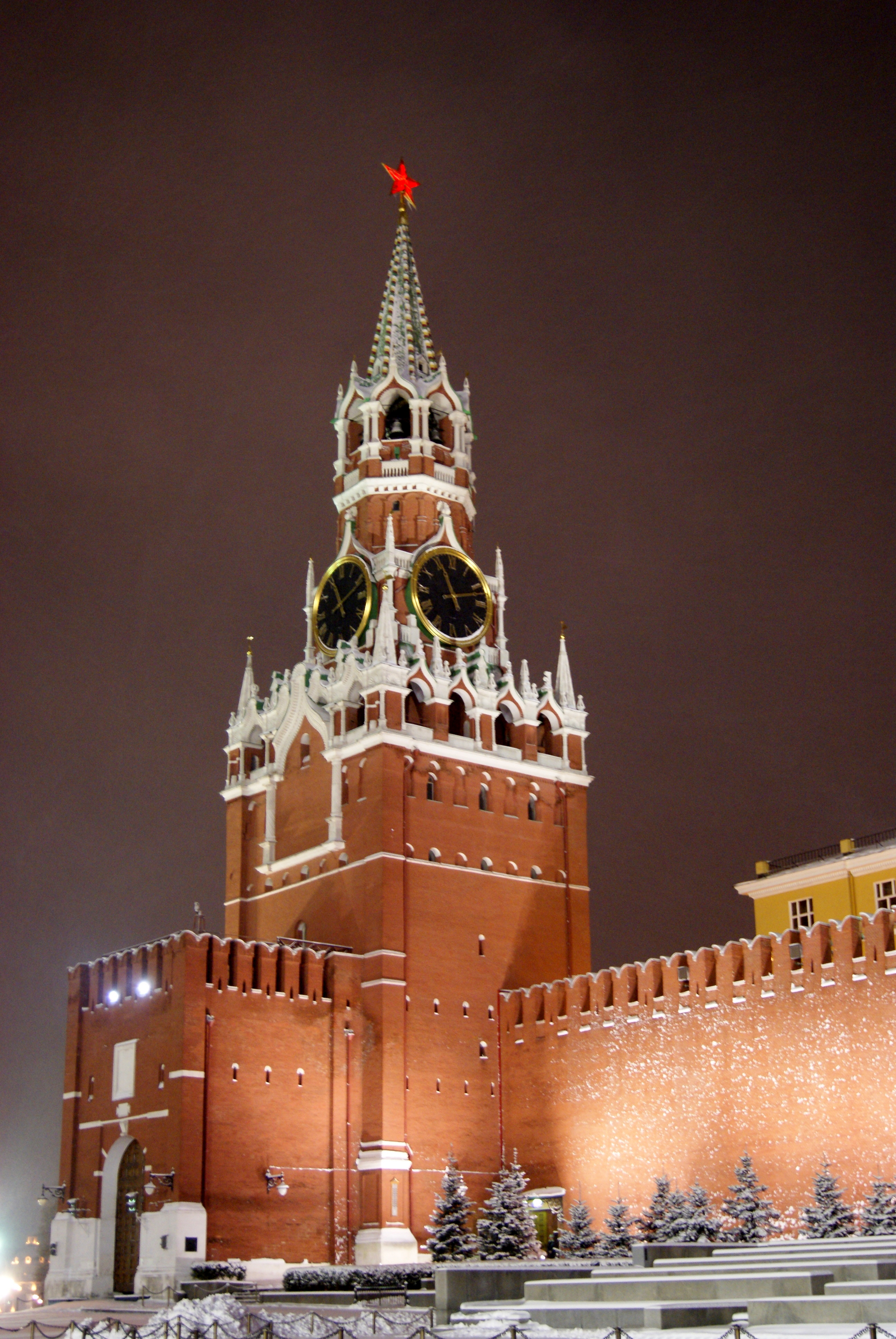 Spasskaya Tower